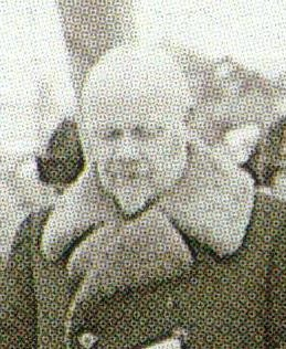 Eduskuntatalon peruskiven muuraus. Puhumassa Wäinö Wuolijoki.